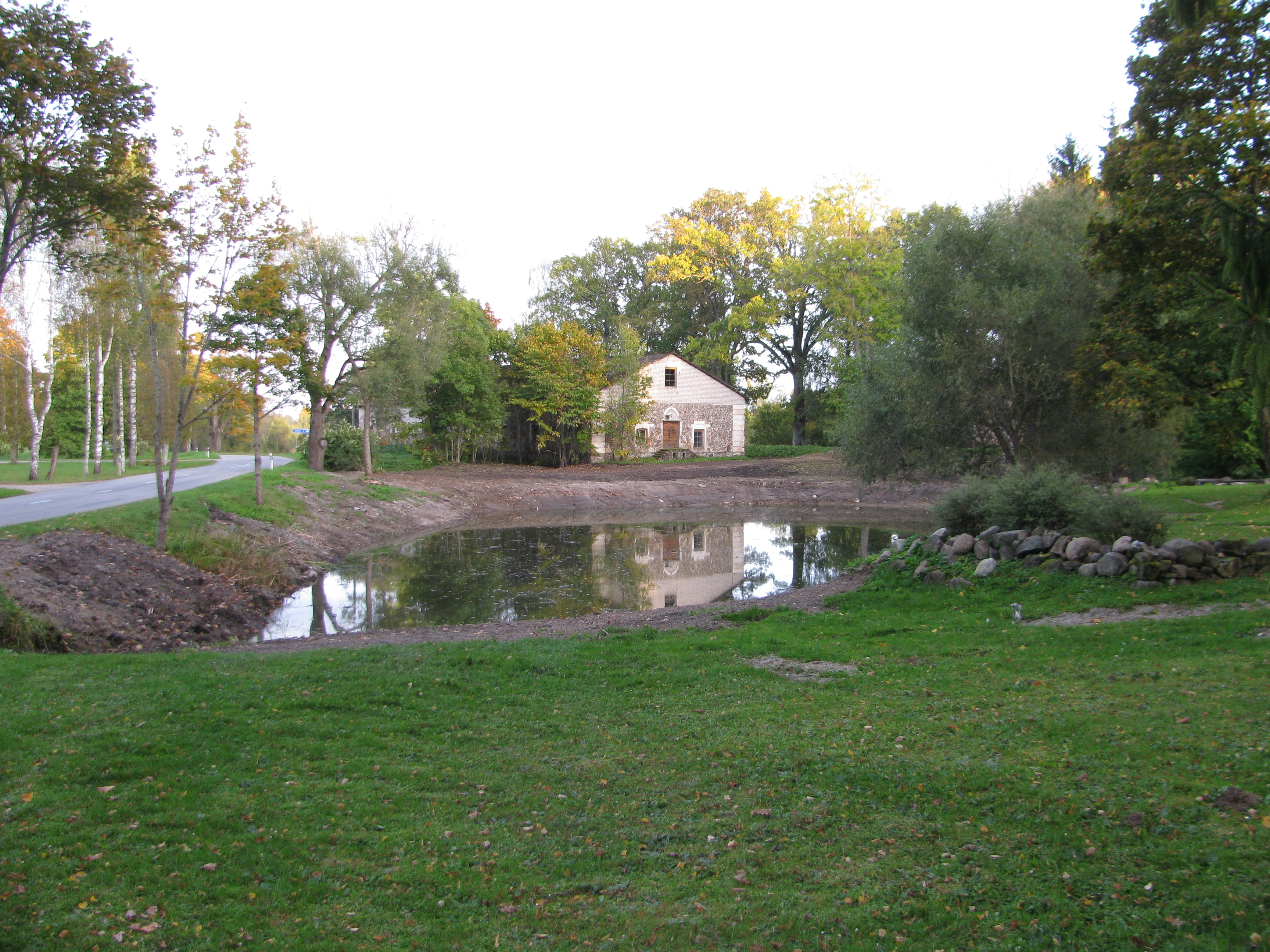 Jaunlaicenes muižas apbūve, Jaunlaicenes pagasts